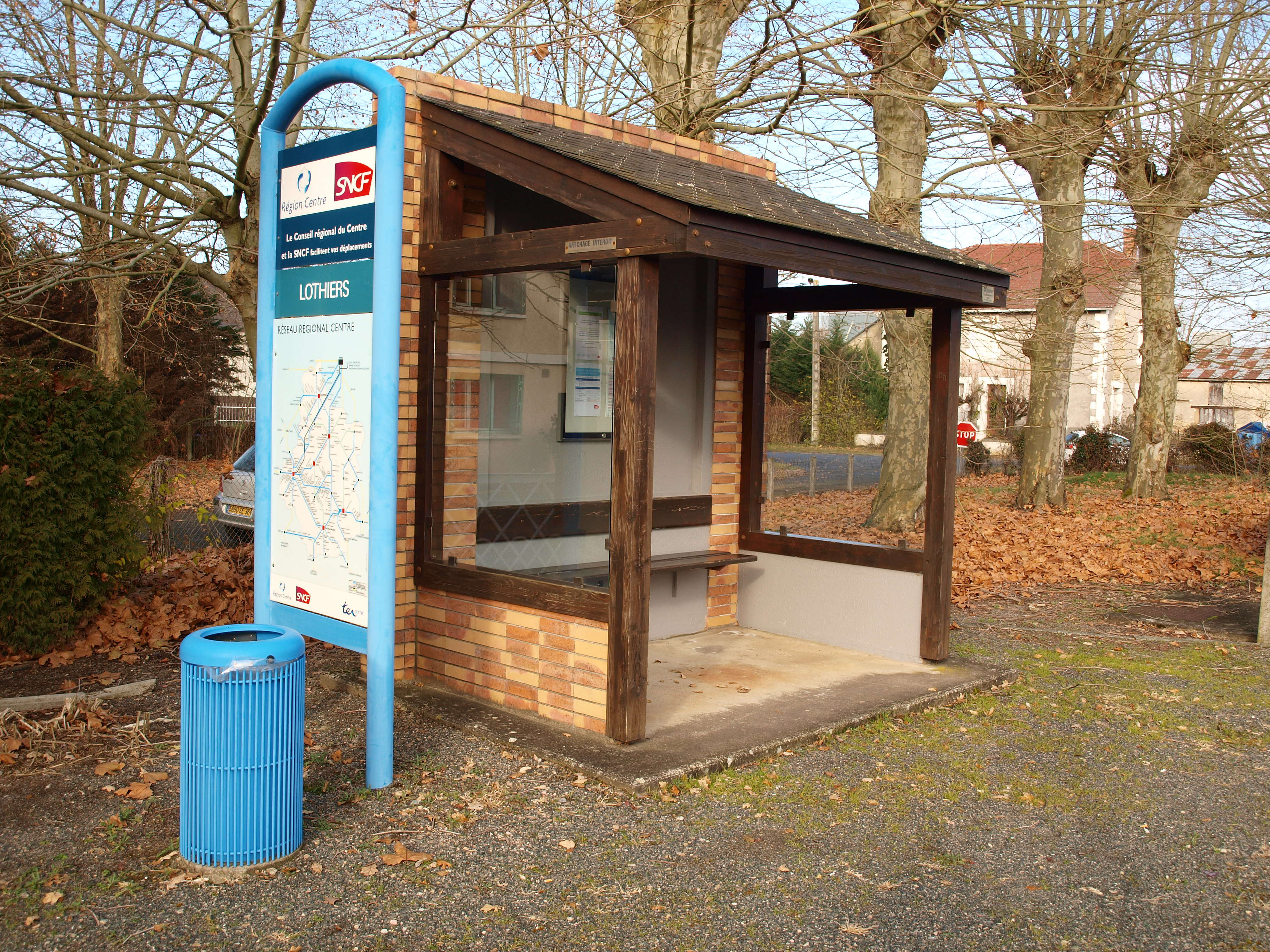 Lothiers-gare (Indre, France)